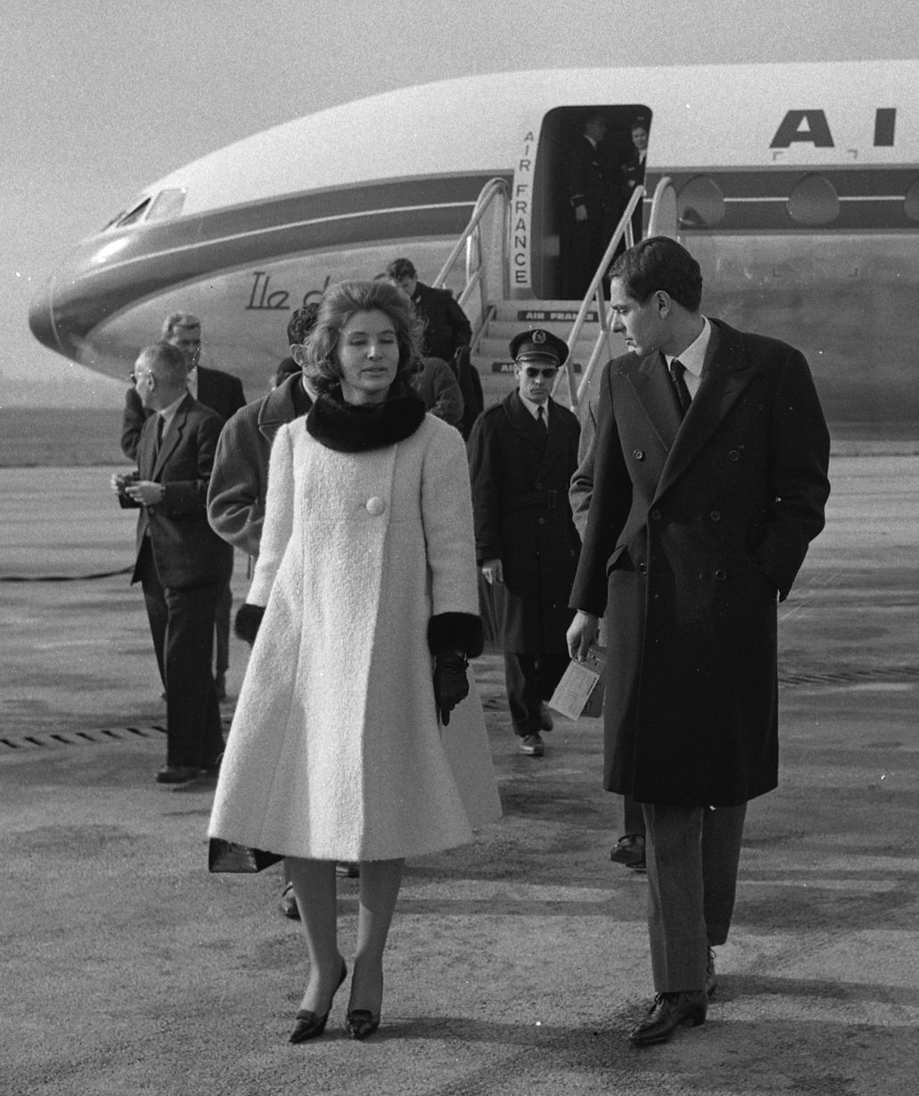 Aéroport Toulouse-Blagnac. 30 novembre 1961. Vue du prince Moulay Abdallah et son épouse libanaise Lamia Solh à la descente de l'avion.